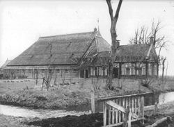 In kop-hals-romppleats